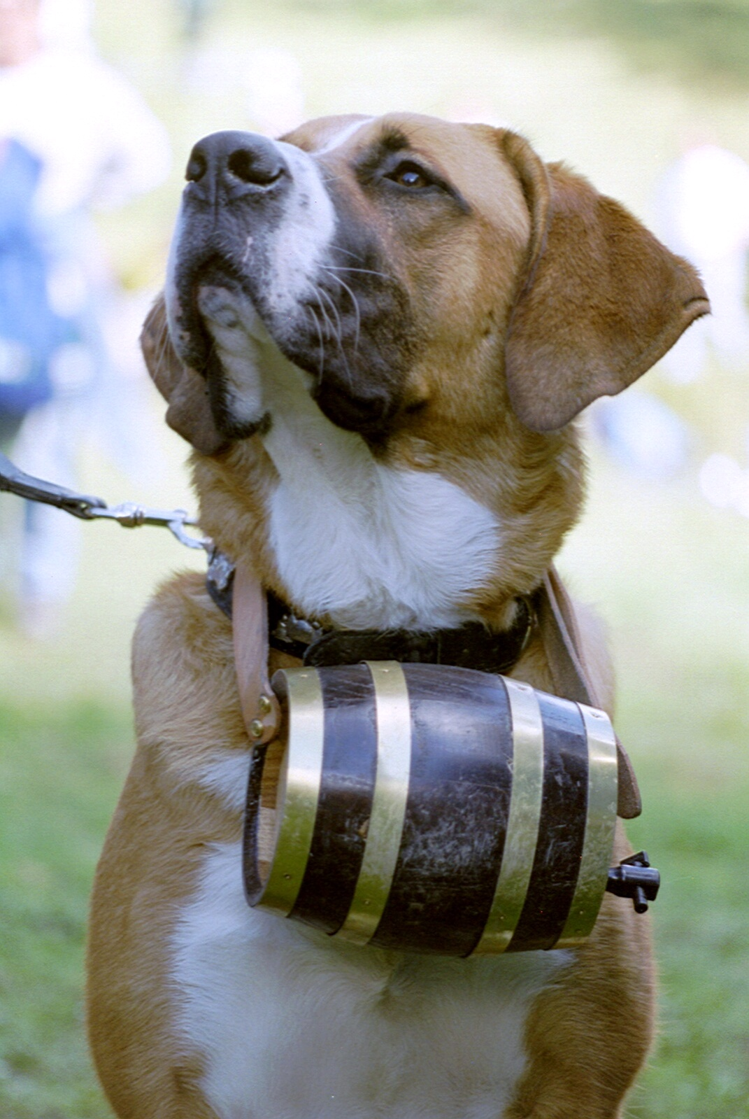 Sankt Bernhard som man gerne ville møde den.